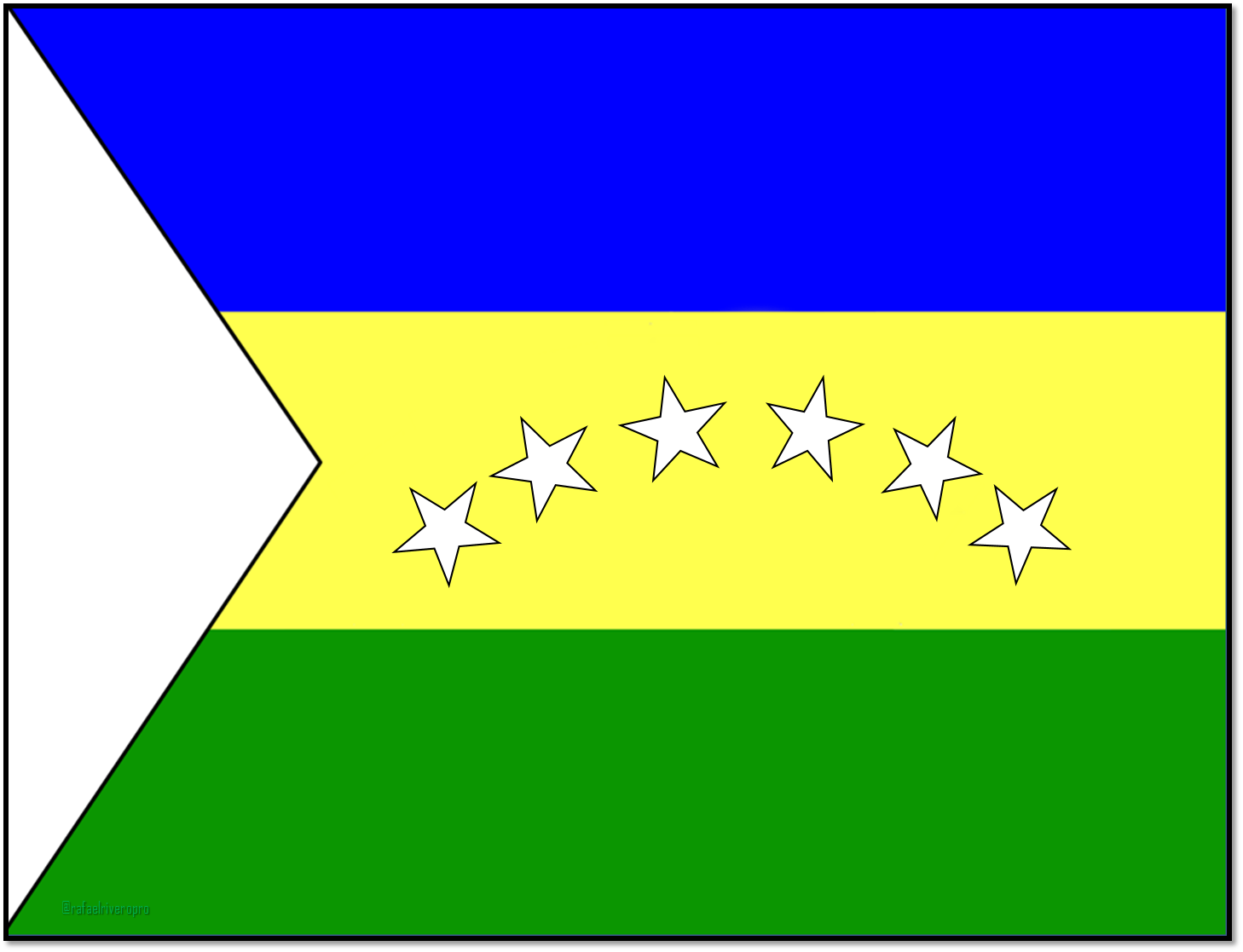 Actualización del Año 2020